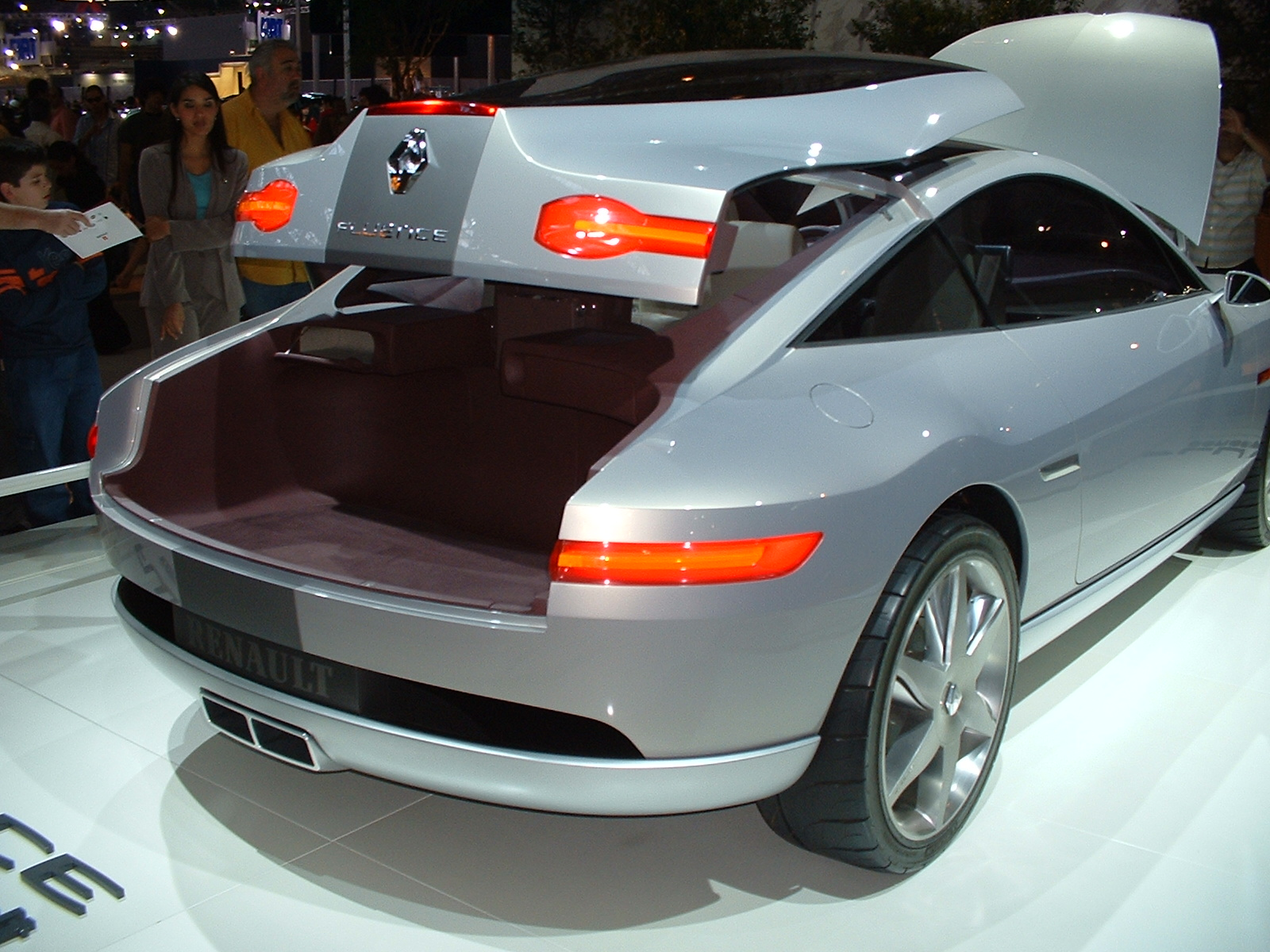 Renault Fluence - Salão Internacional do Automóvel 2006, São Paulo.